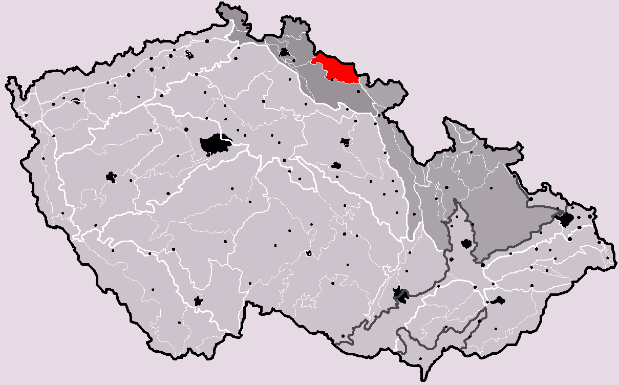 Poloha geomorfologického celku Krkonoše v rámci České republiky. Hercynský systém Hercynská pohoří I Česká vysočina I4 (IV) Krkonošsko-jesenická subprovincie I4A (IVA) Krkonošská oblast I4A-7 (IVA-7) Krkonoše